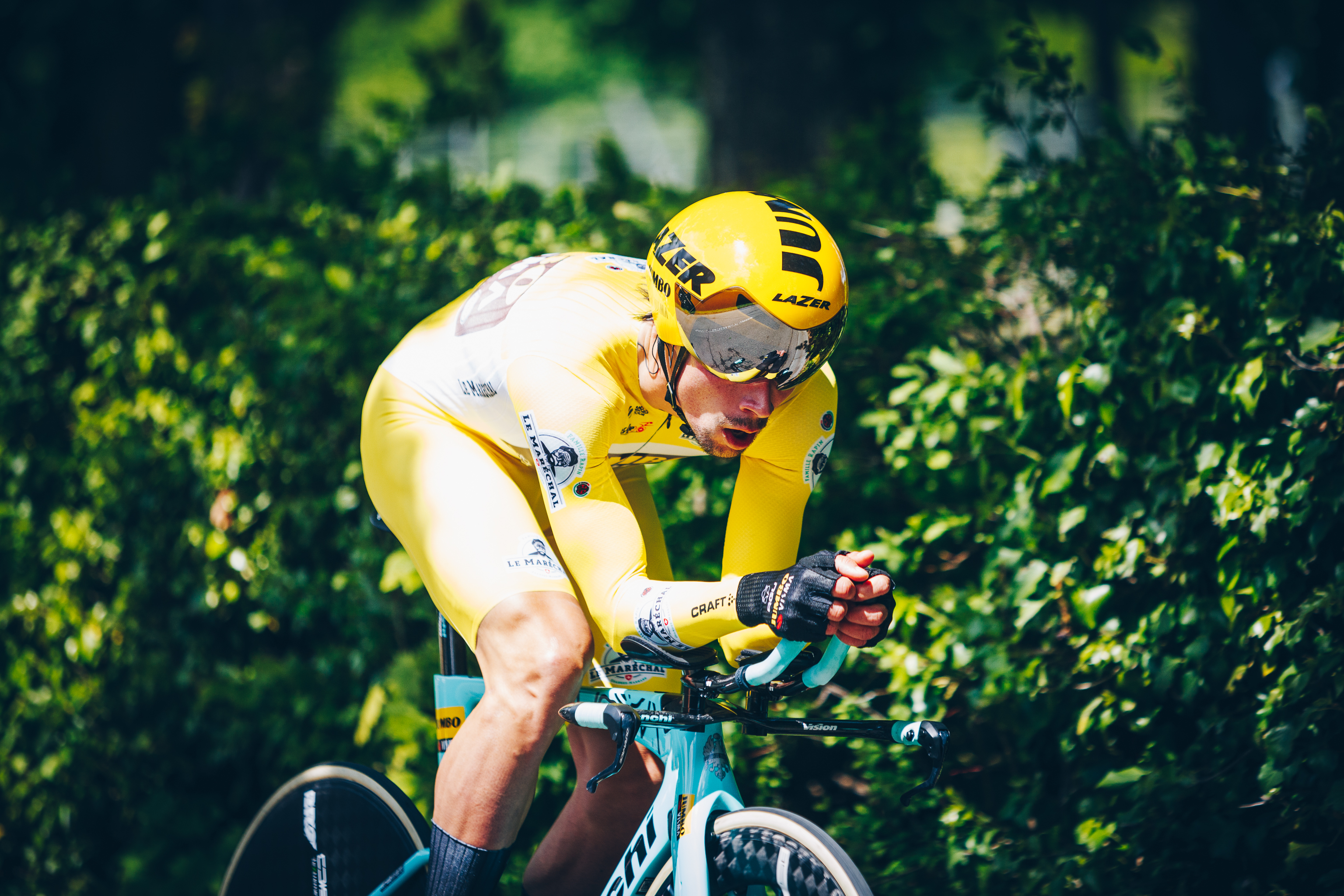 Primoz Roglic auf der 5. Etappe der Tour de Romandie 2019 in Genf